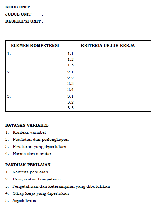 Struktur Unit Kompetensi berdasarkan Peraturan Menteri Ketenagakerjaan Nomor 3 Tahun 2016